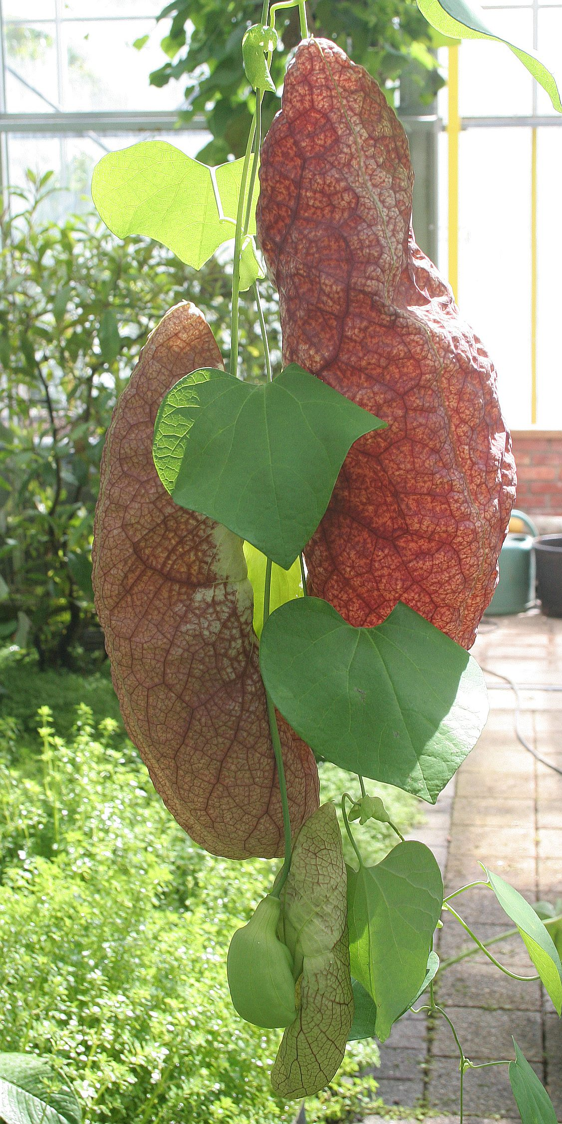 Aristolochia gigantea Conservatoire botanique national de Brest, France, juin 2007